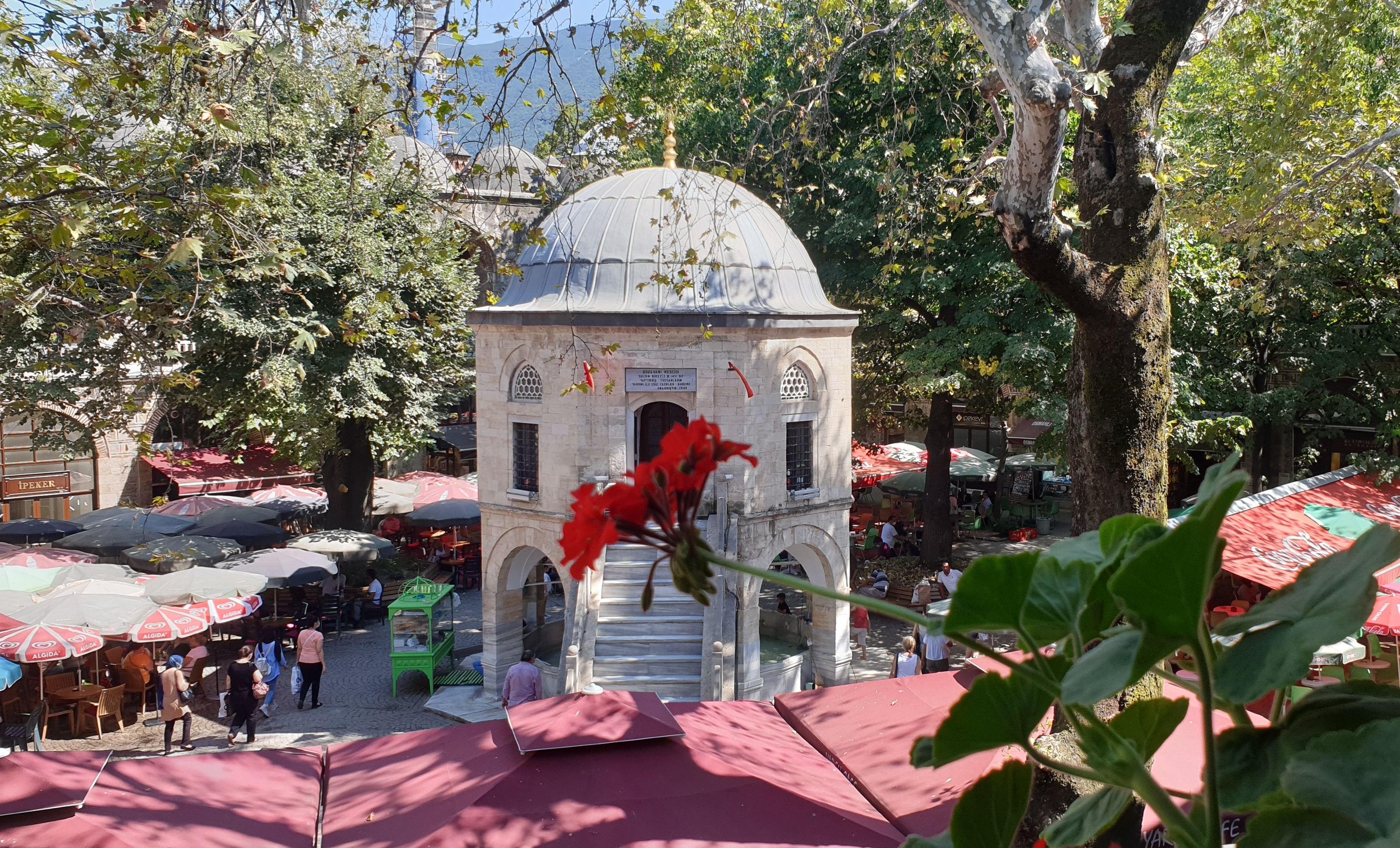 Bursa'daki Koza Han Mescidi